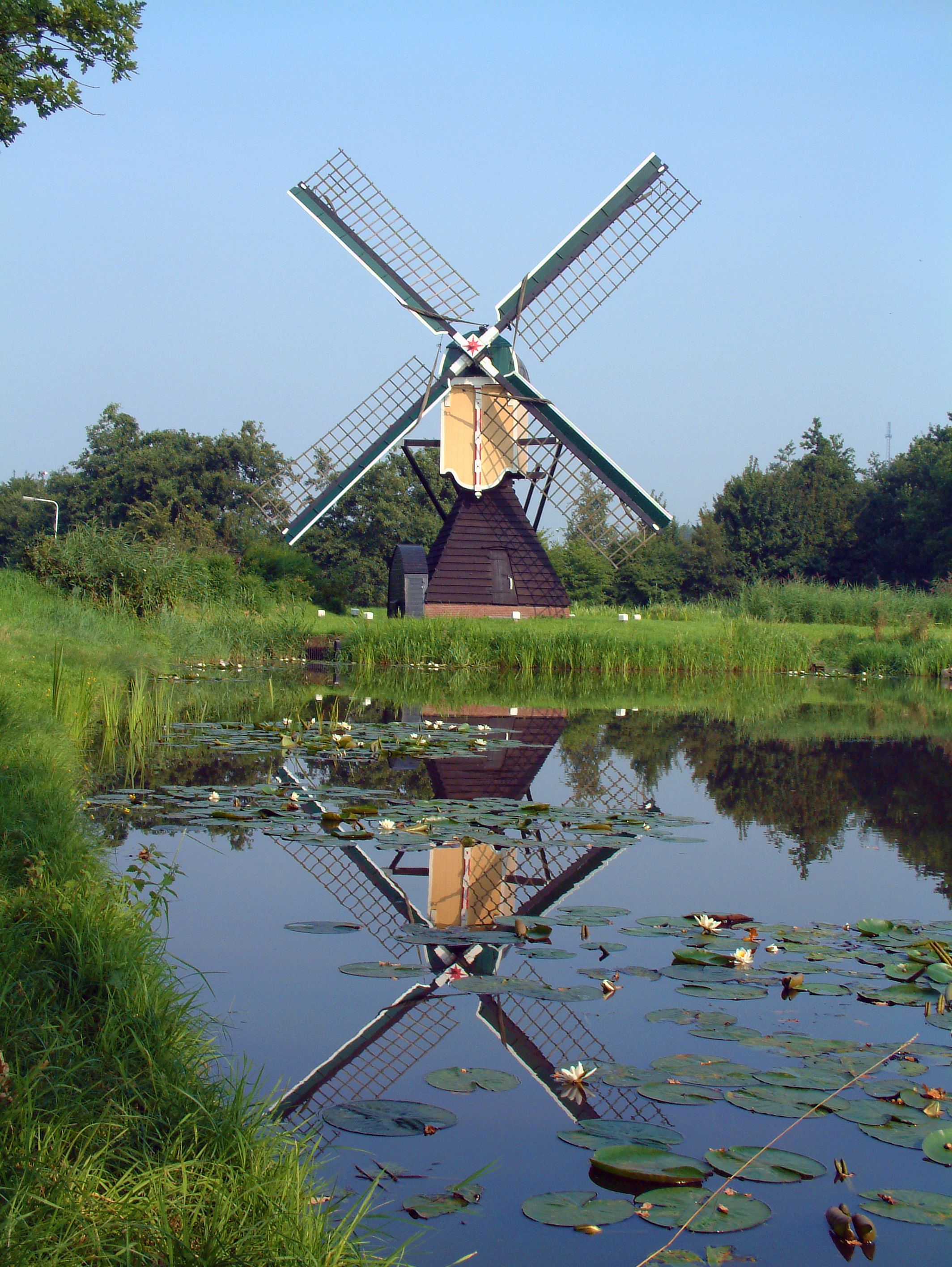 Maredijkmolen Address - Zweilandlaan 3 t.o. Municipal Polder Wipmolen Bouwjaar 1735 / Vlucht 15.5 meter Gemente Leiden